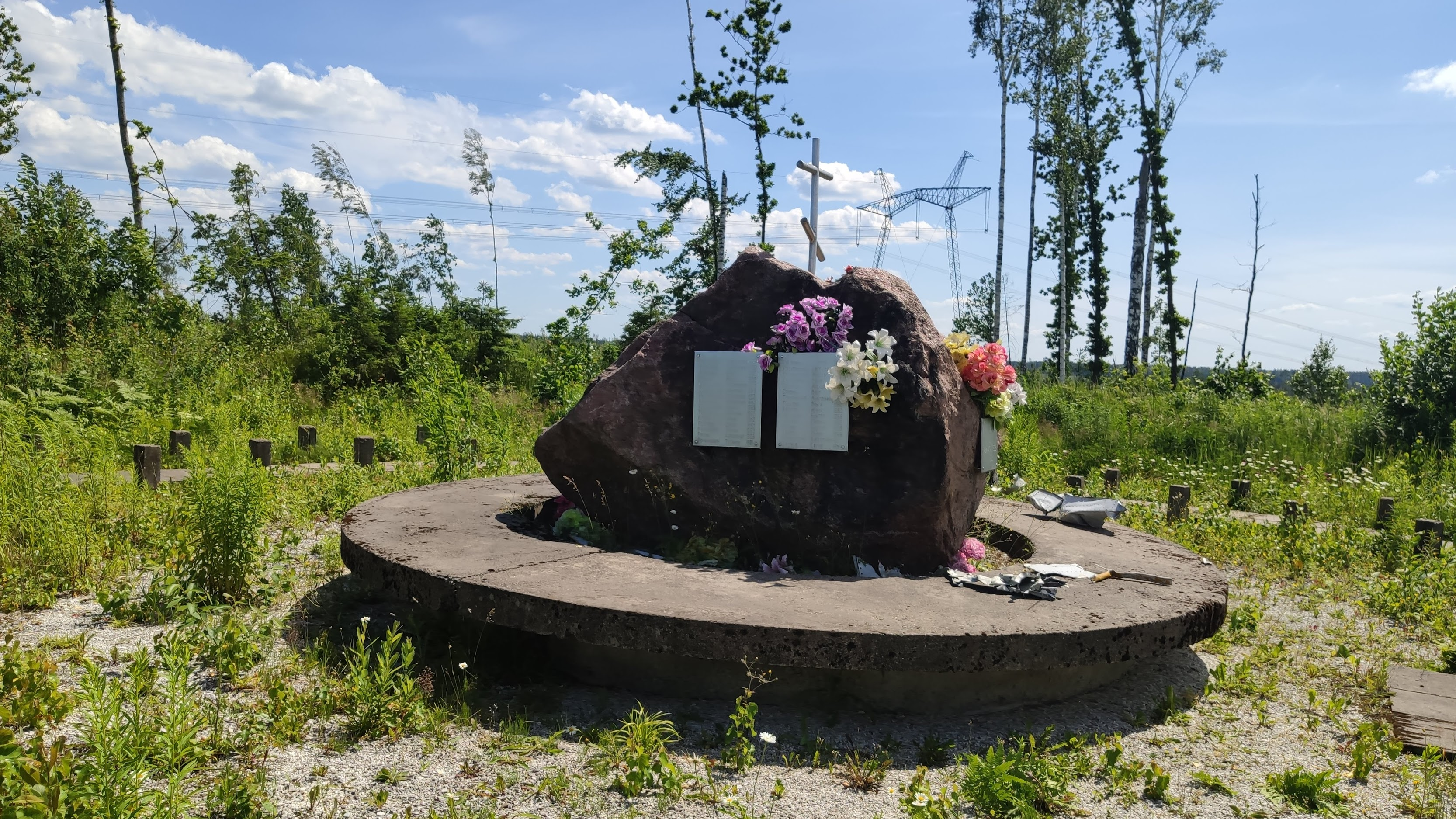 Памятник на месте крушения